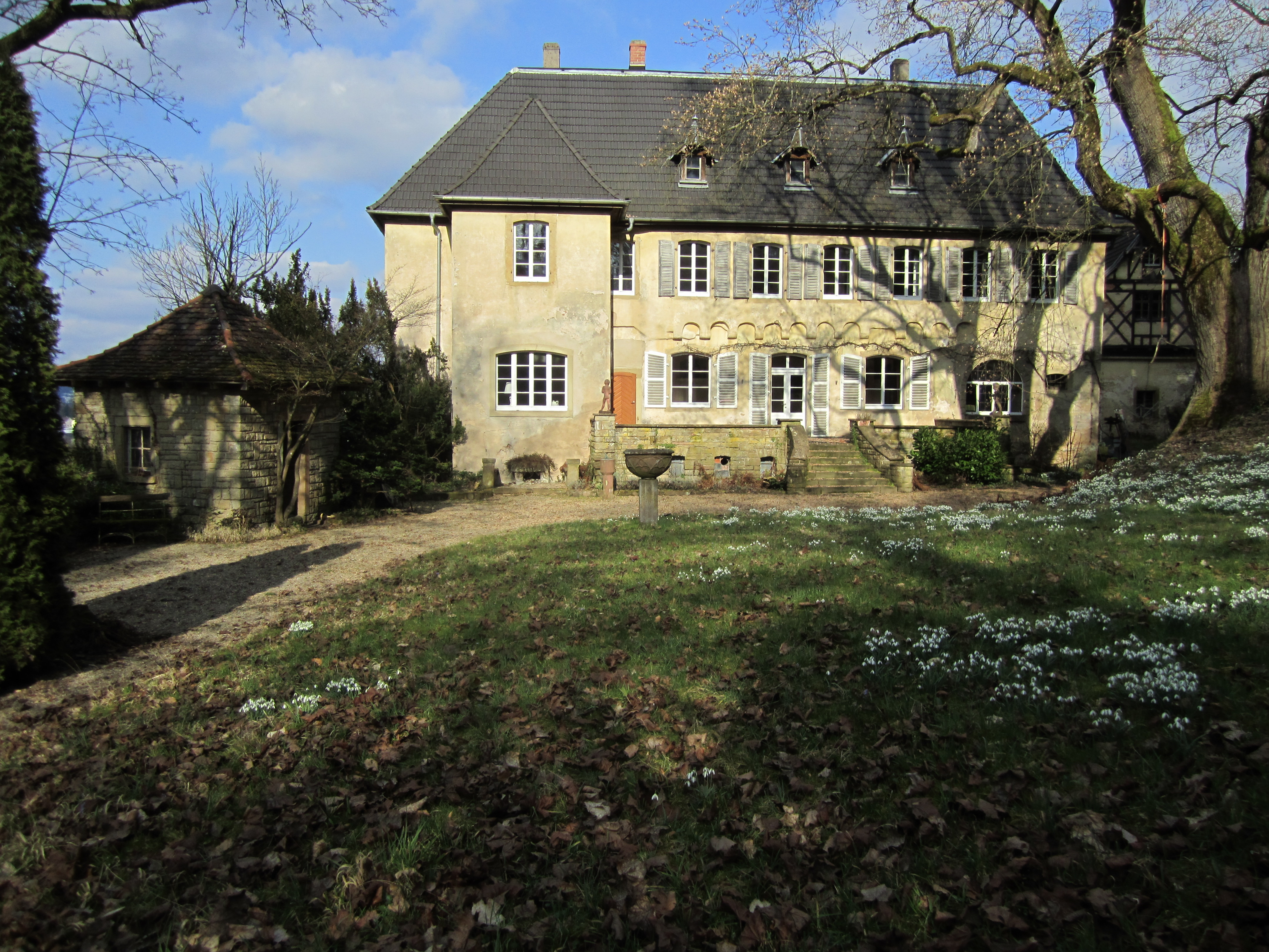 Schloss Hochhausen mit Blick Richtung Nordosten fotografiert. Von der mittelalterlichen Burg ist zwischen dem Erdgeschoss und dem ersten Stock ein Rundbogenfries erhalten geblieben. Links ist das ehemalige Fährhaus von Hochhausen (Haßmersheim) zu sehen, das ursprünglich am Neckarufer stand.